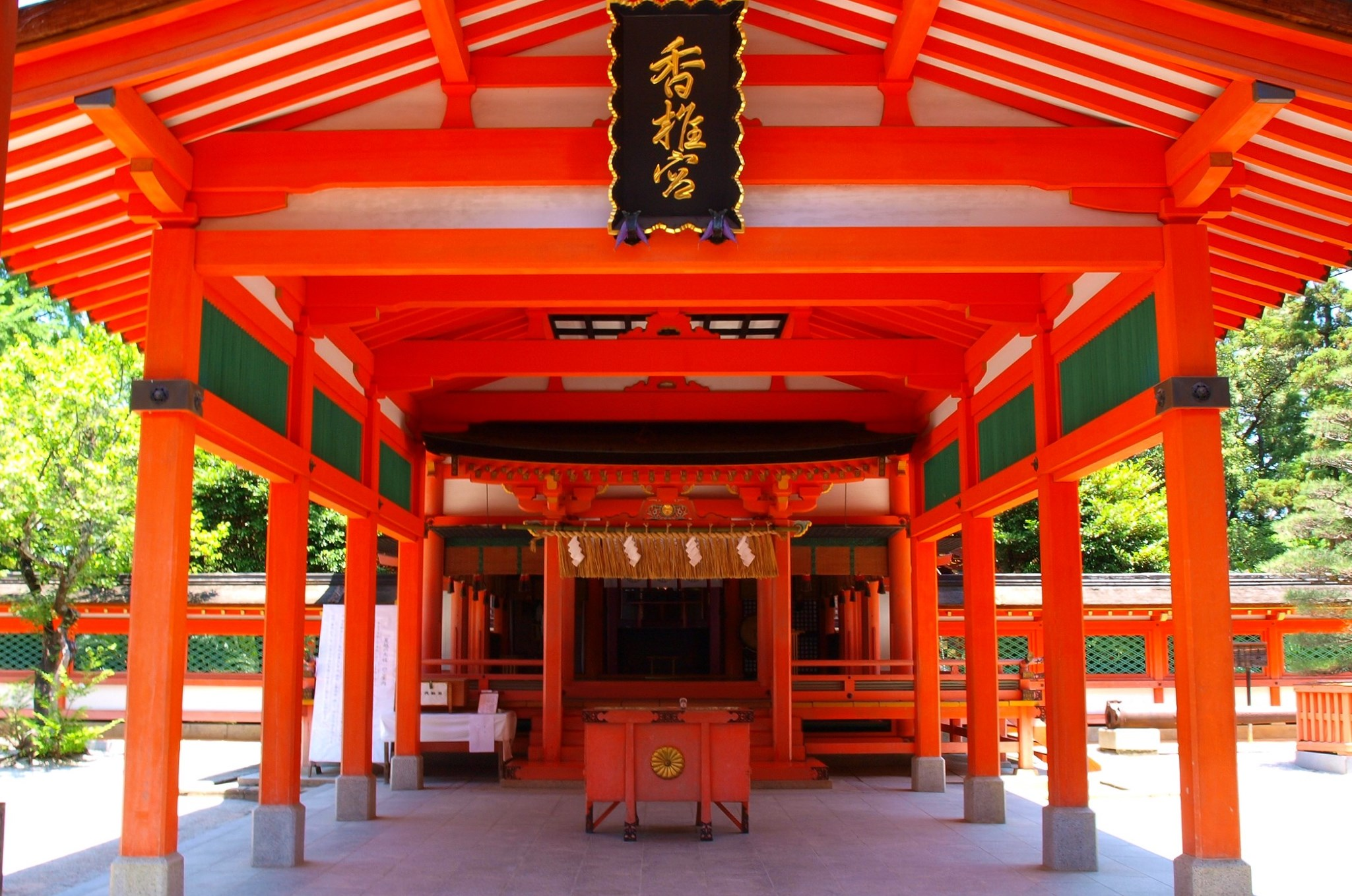 福岡市東区にある香椎宮の幣殿